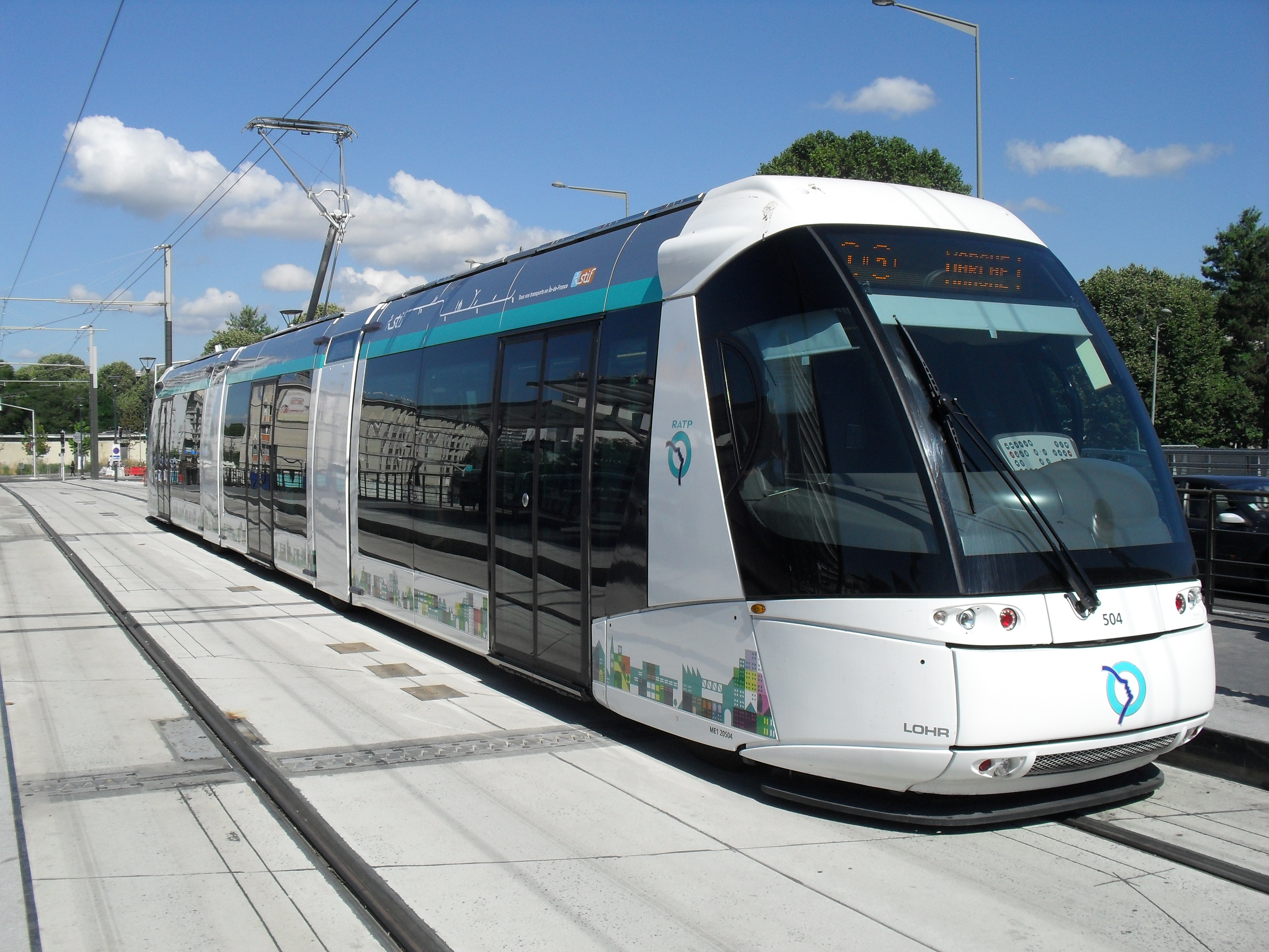 Une rame Translohr de la ligne T5 à la station "Garges-Sarcelles".